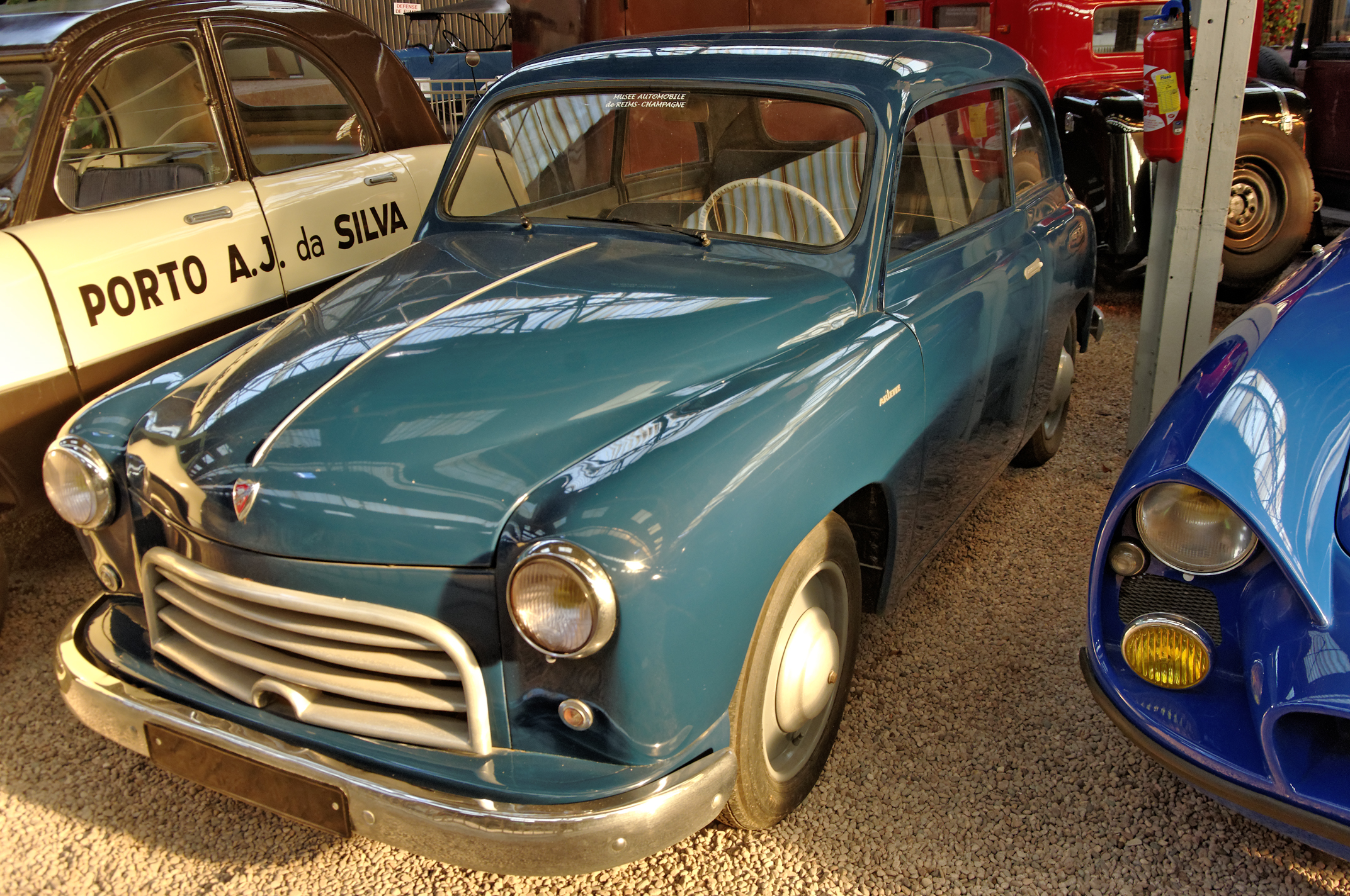 Rosengart Ariette (1953), Berline 2 portes, 4 places, 4 cyl., soupapes latérales, 747 cm3, 21 ch., vitesse max. 95 km/h(Musée Automobile Reims Champagne, Reims, Marne, France)